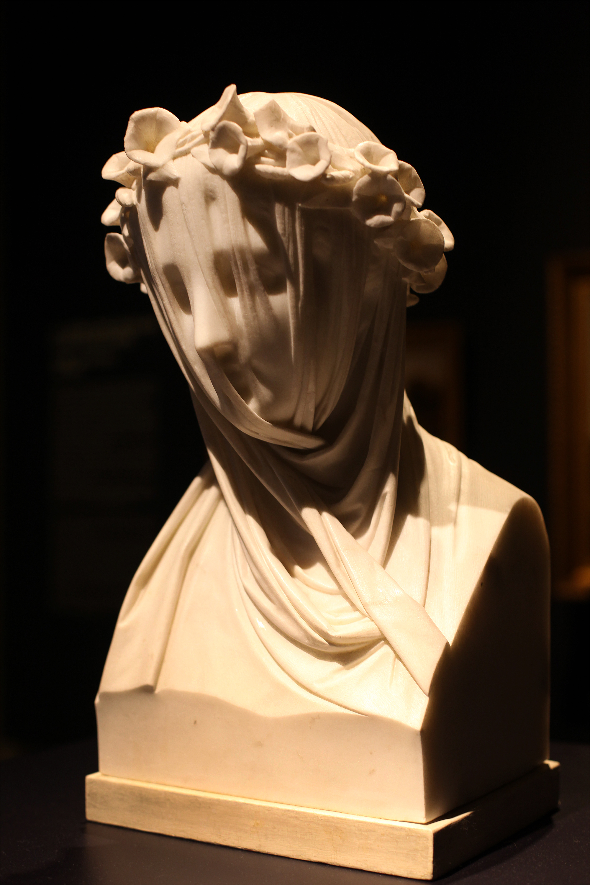 Raffaele Monti (1818-1881) Dama Velata (1845); fotografata alle Gallerie d'Italia di Milano, alla mostra Romanticismo, novembre 2018